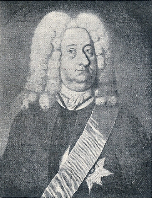 Ditlev Vibe 1670-1731. Gehejmeråd hos Frederik 4. Ridder af Danebrog og Elefantordenen.